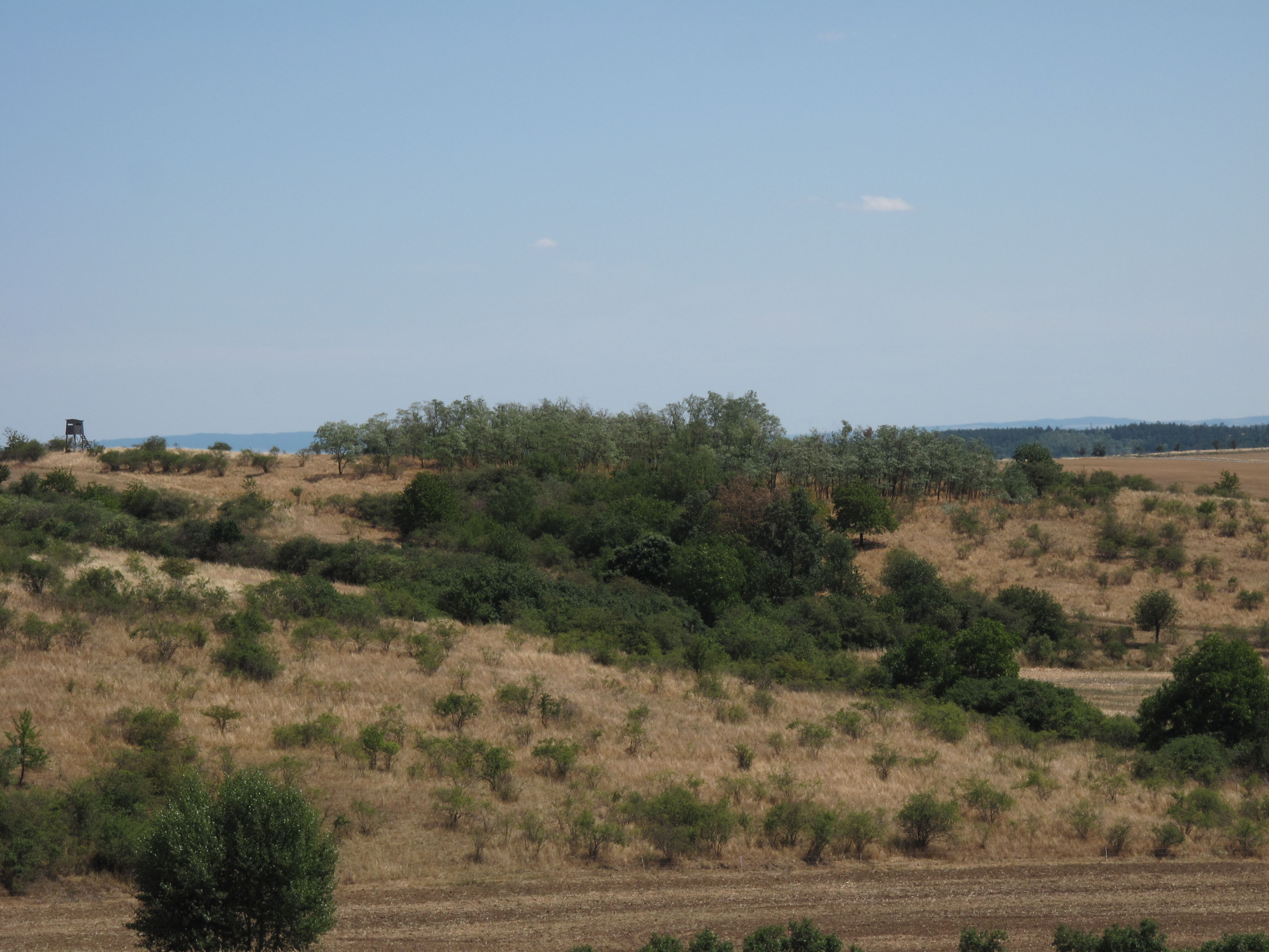 Přírodní památka Rudlické kopce. Okres Znojmo, Česká republika.